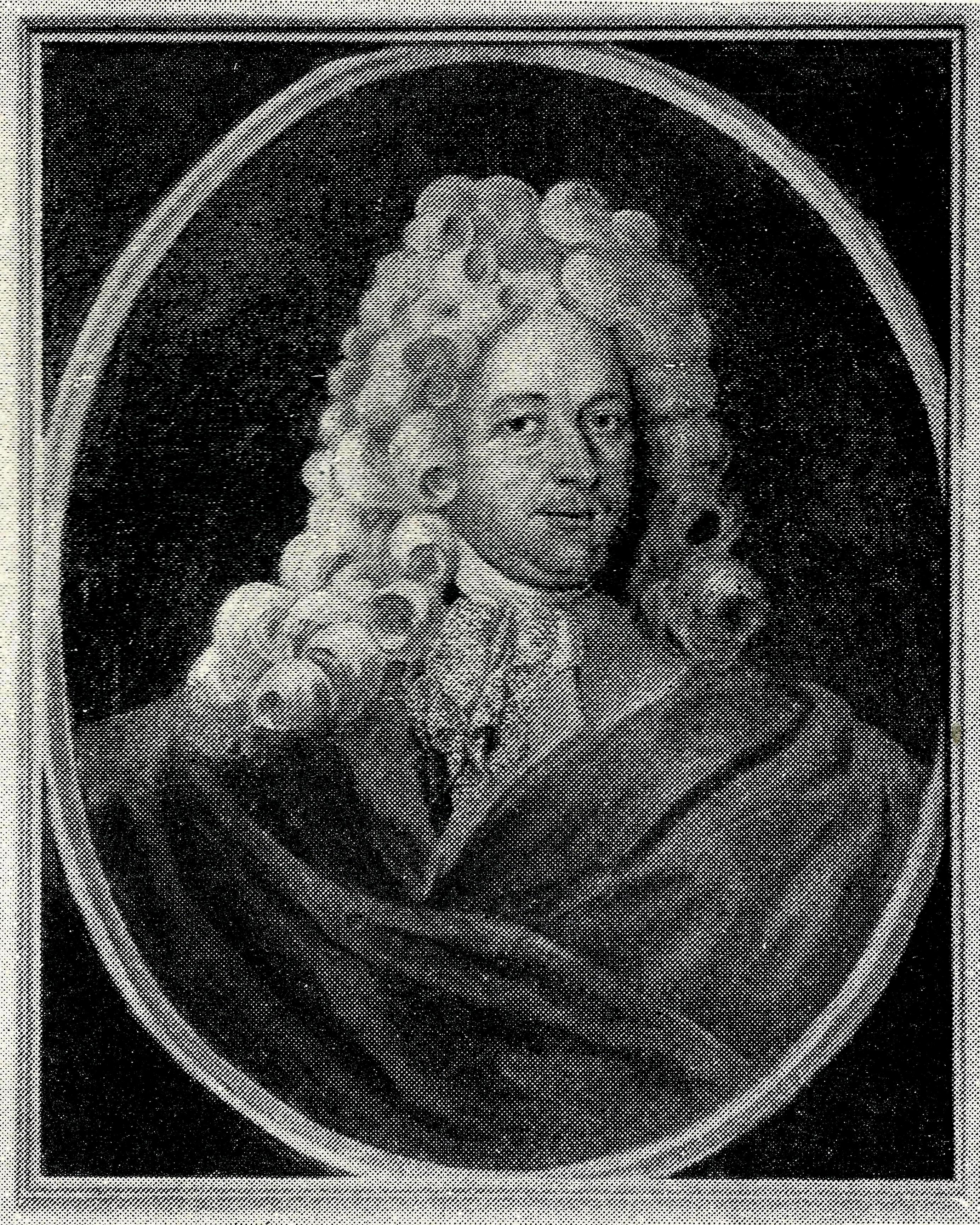 Der Sekretär des hansekontors in Bergen Christian Wilhelm Höltich (* 1671; + nach 1717). Porträt im Hanseatischen Museum in Bergen (Inventarnummer: HMB 422).